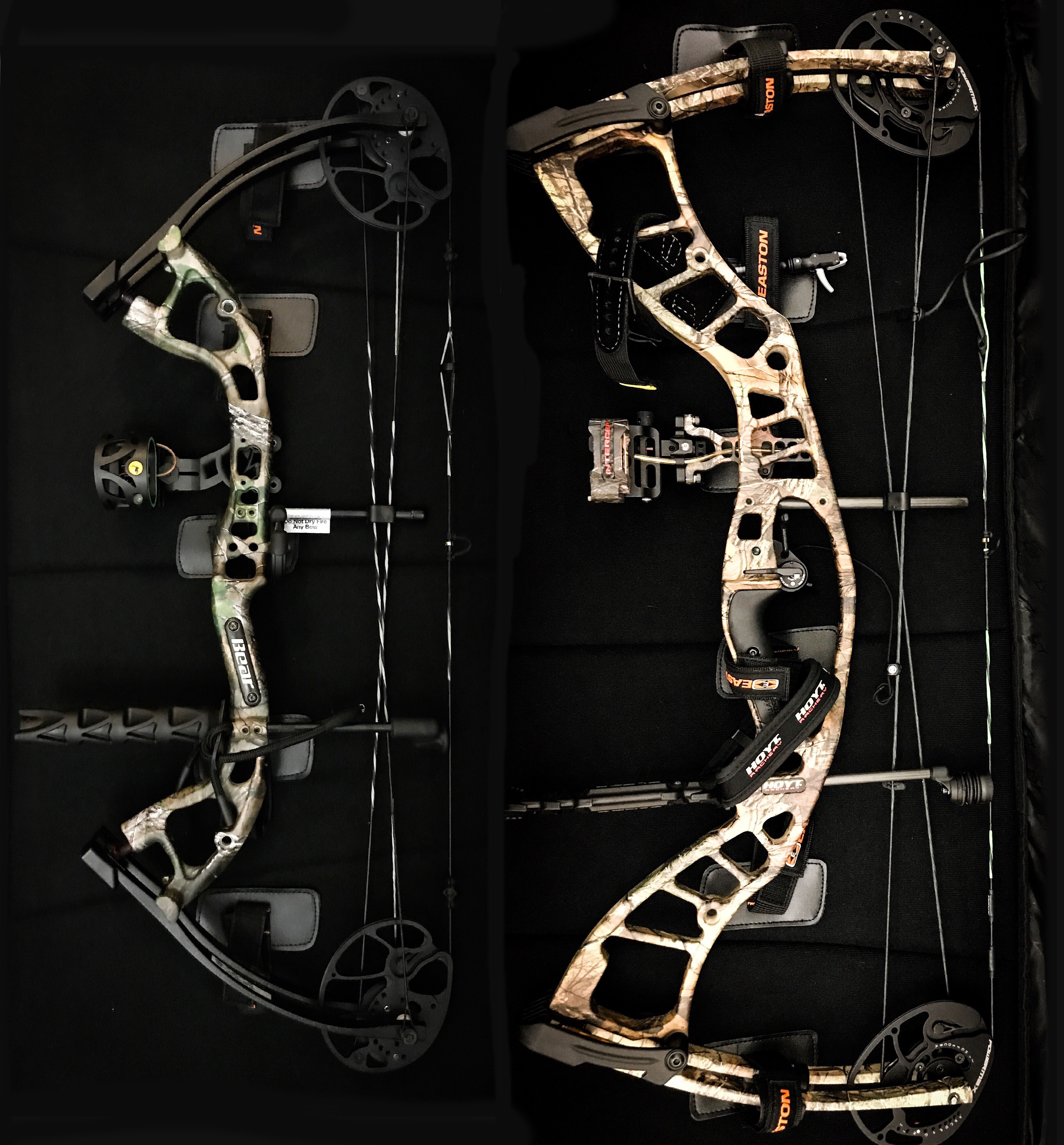 Bear Cruzer Lite oraz Hoyt Powermax